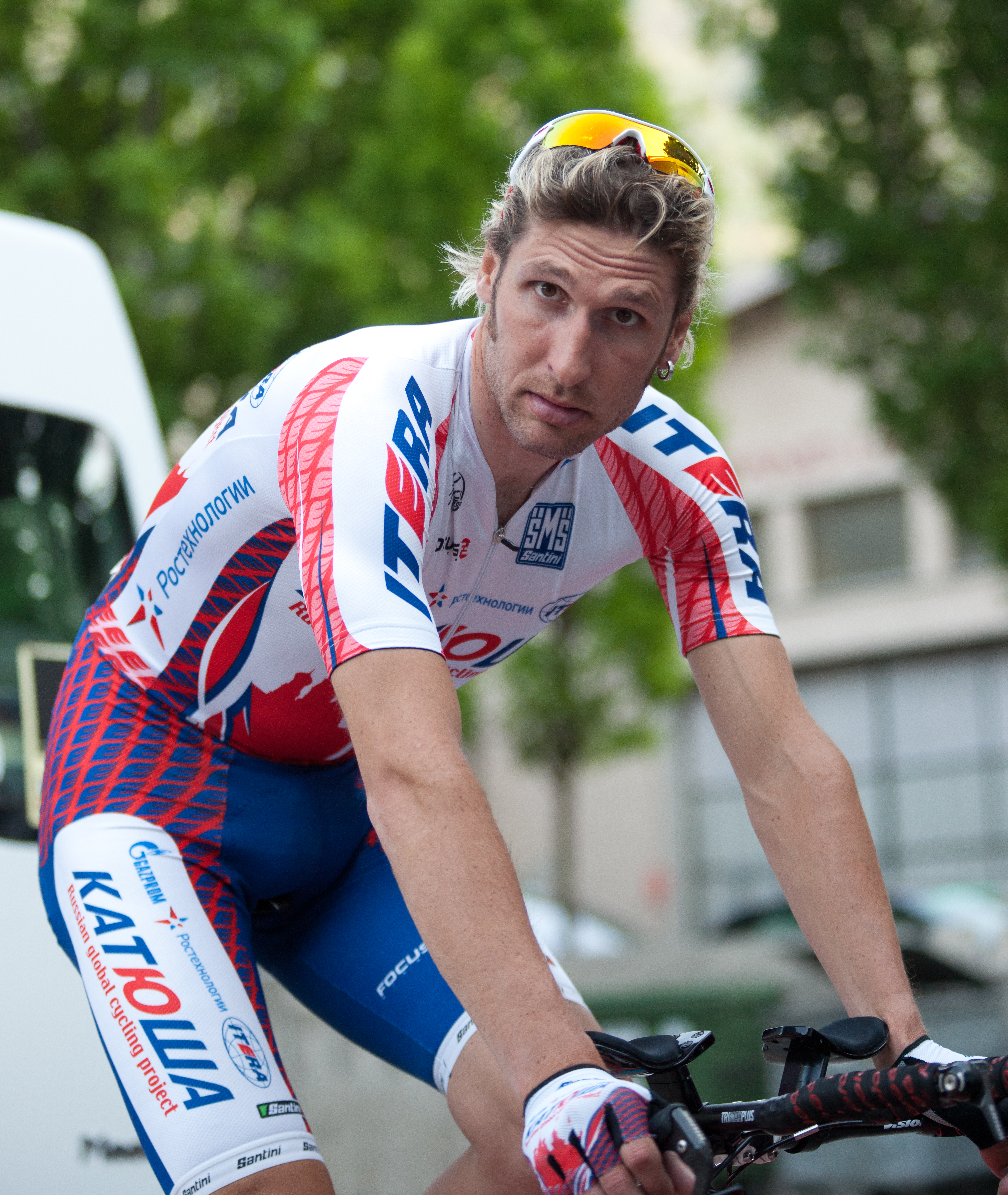 Contre la montre - Romandie 2010